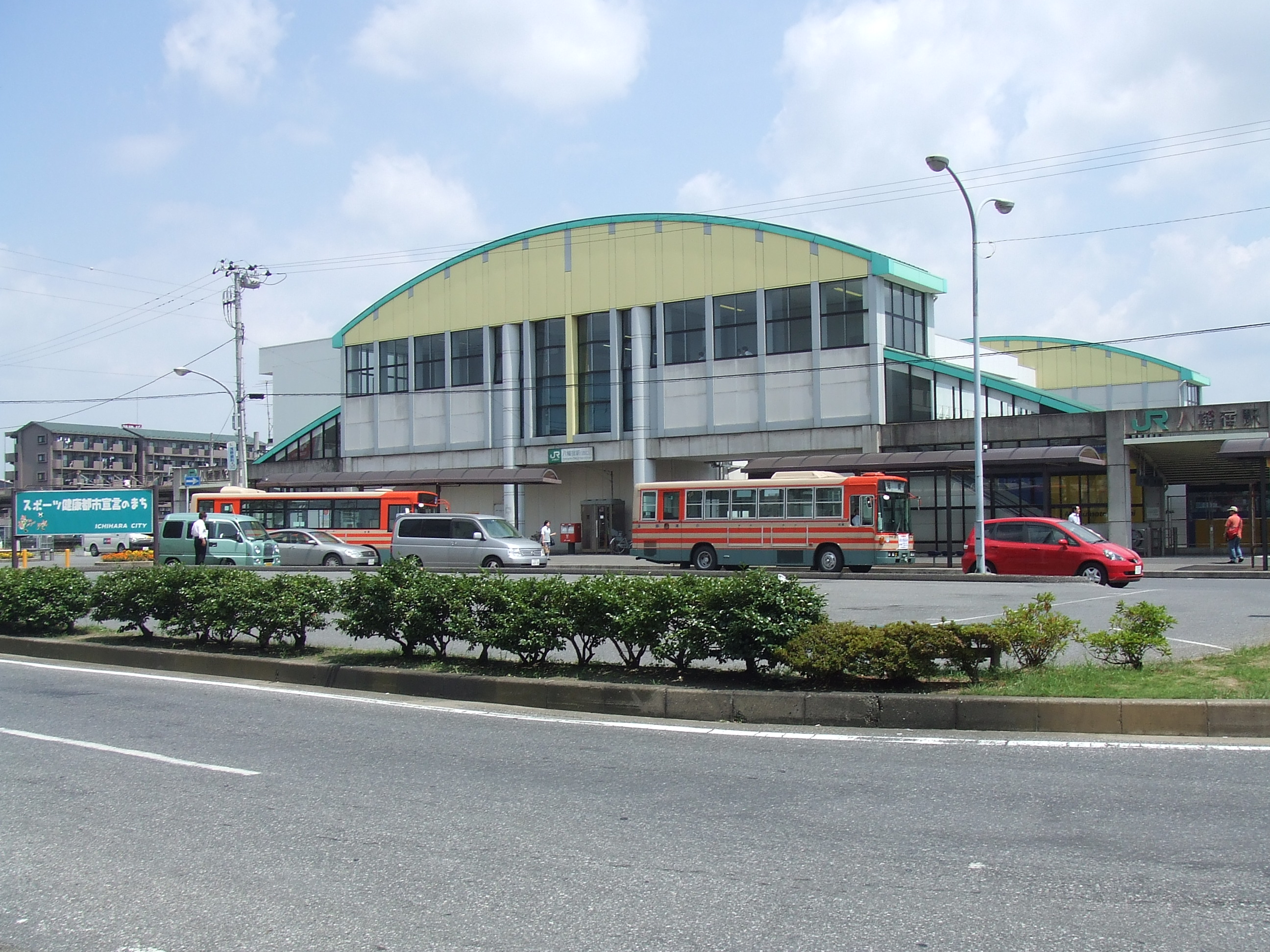 Yawatajuku Station east exit, Ichihara, Chiba, Japan